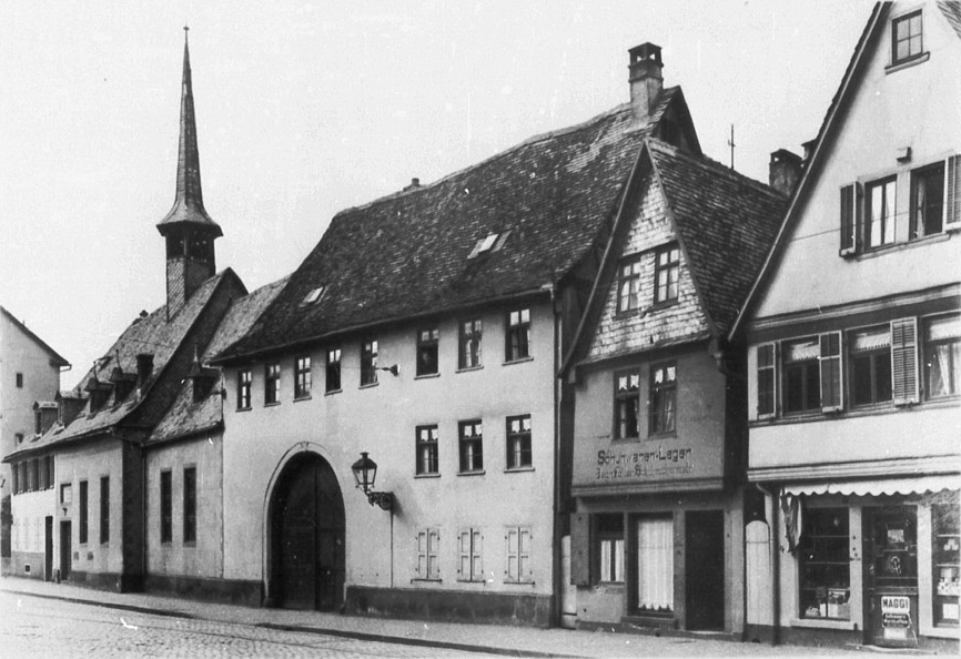 Ehemalige Hospitalkirche in der Hanauer Vorstadt